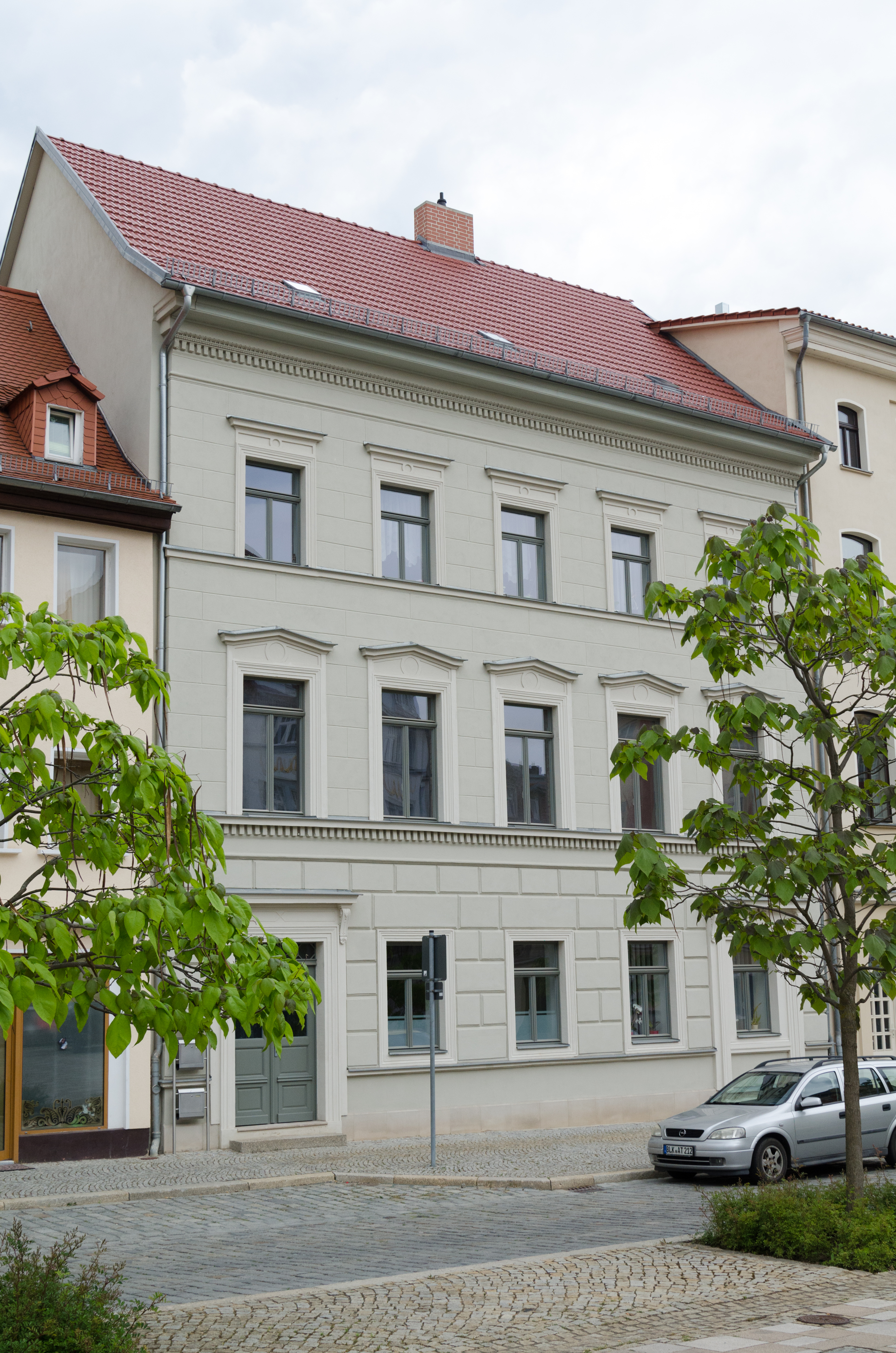 Zeitz, Neumarkt 19